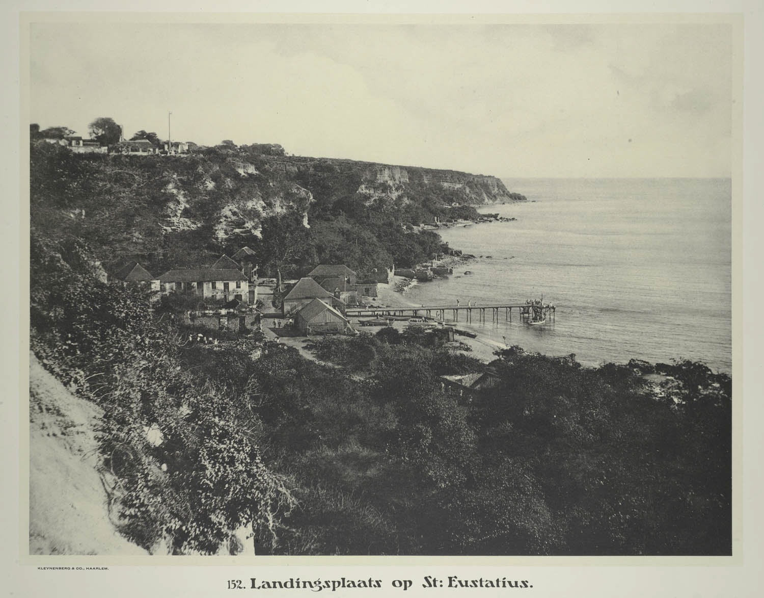 schoolplaat / foto.